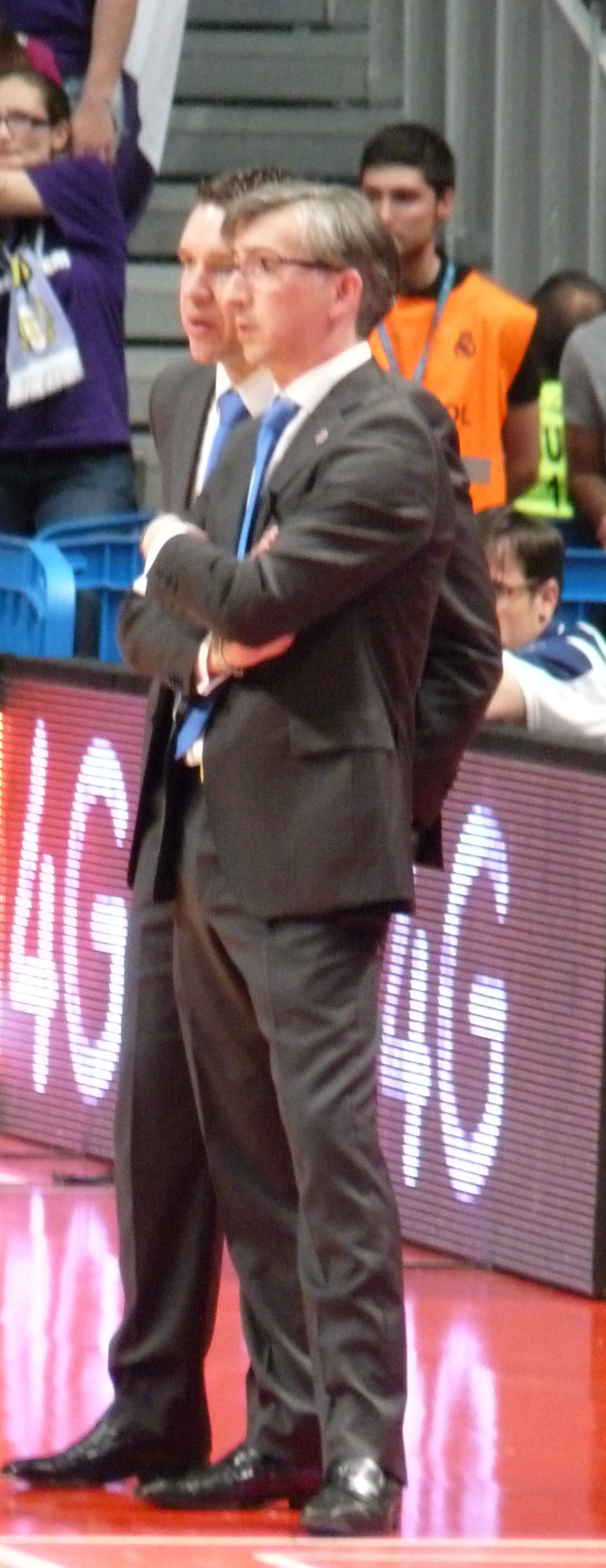 Moncho Fernández, el alquimista